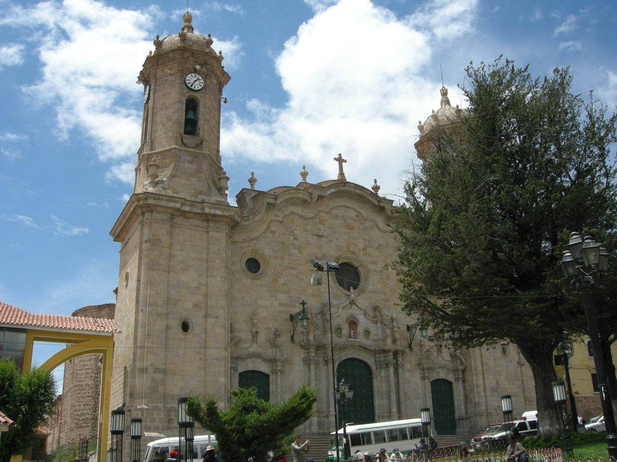 Catedral de la ciudad boliviana de Potosí